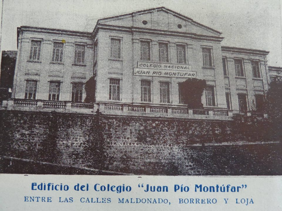 Primer local del Colegio Montúfar ubicado entre las calles Maldonado, Borrero y Loja en el centro histórico de la ciudad de Quito, Ecuador.